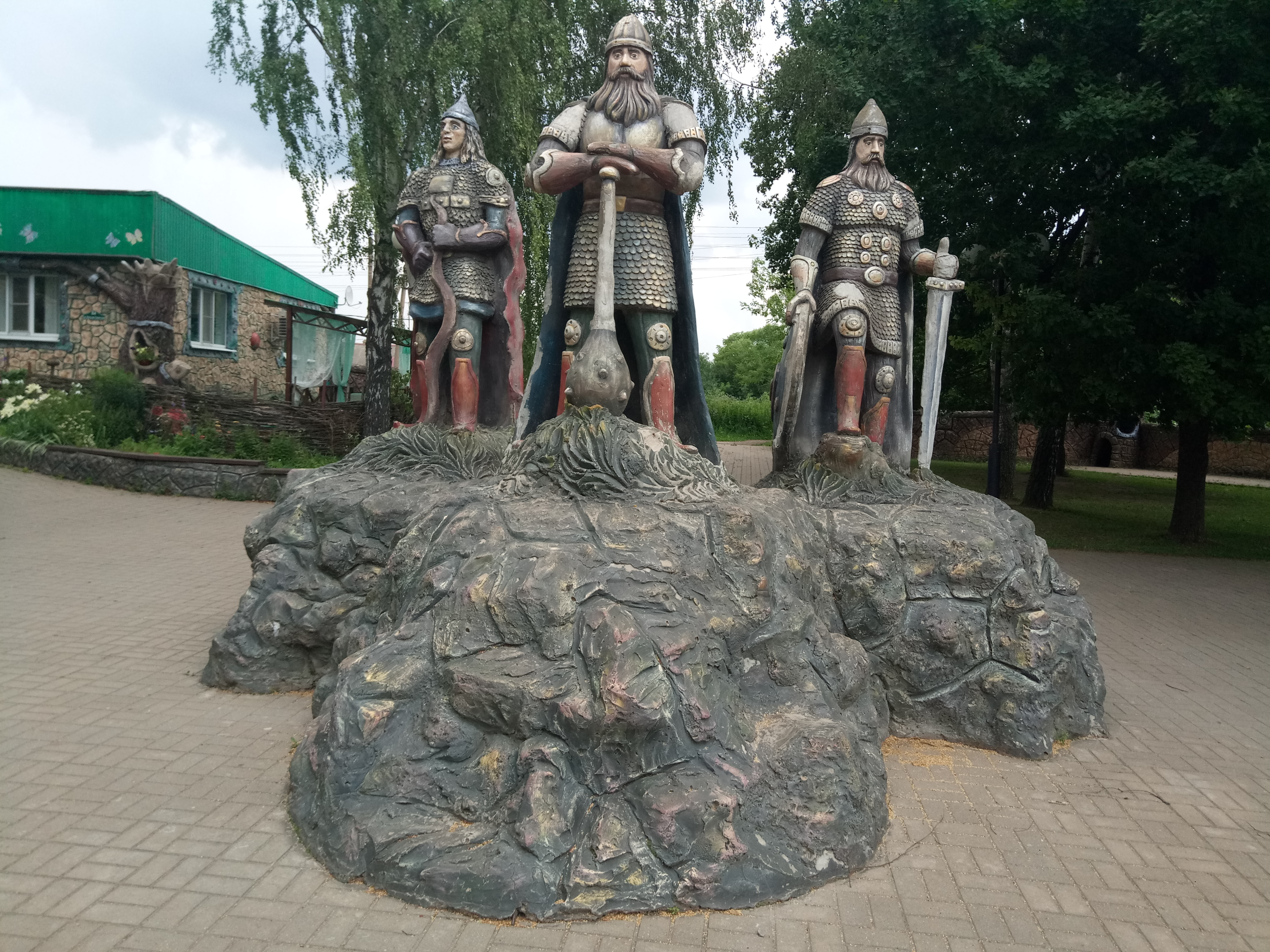 Три богатыря в парке Козельска